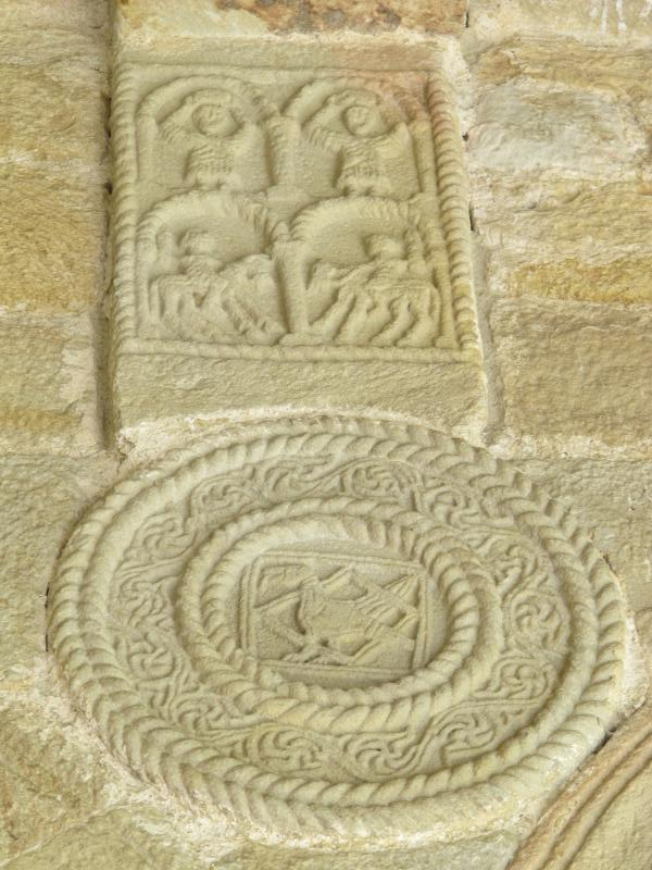 Detalle interior de Santa María del Naranco (Oviedo)